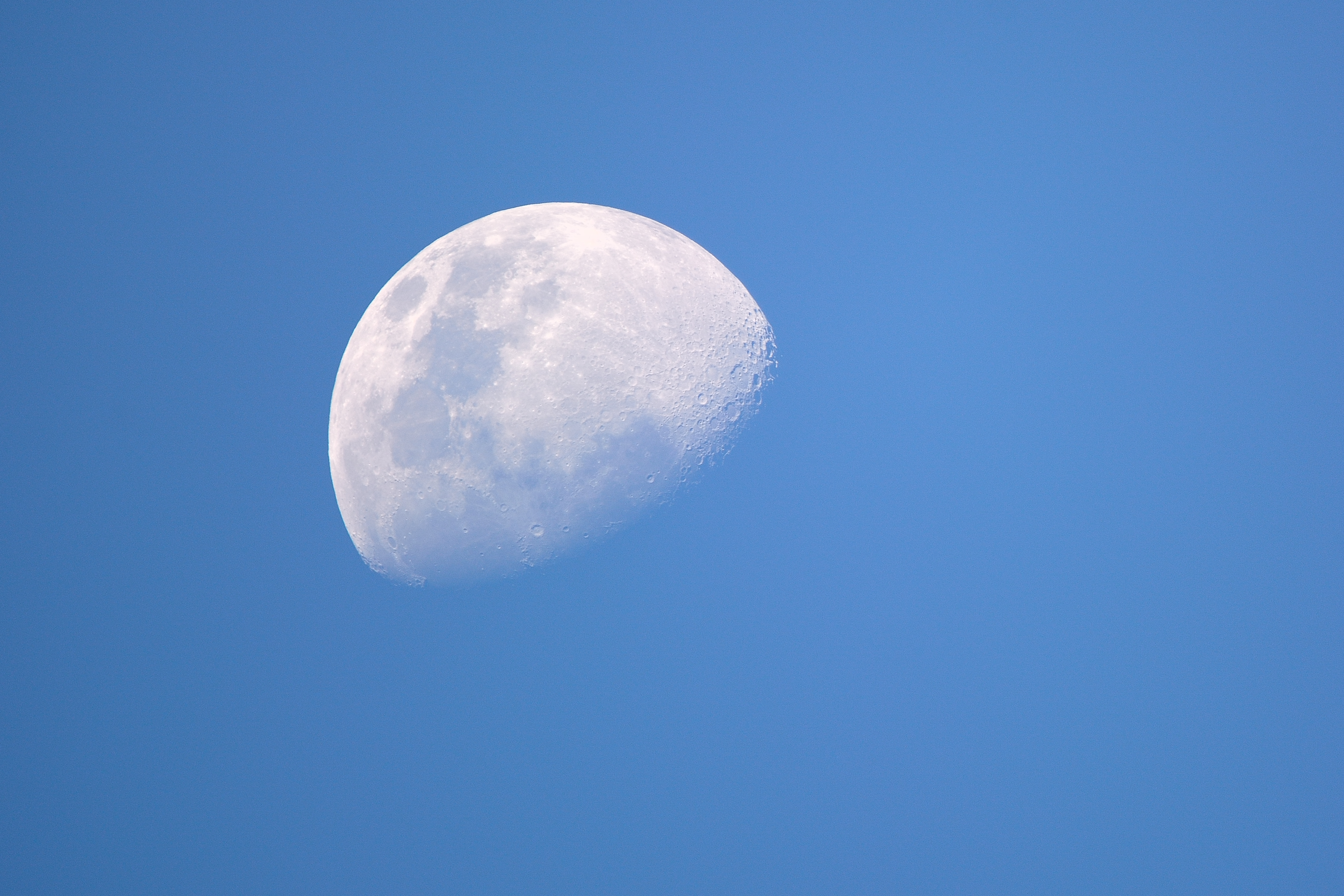 Luna Creciente de Marzo del 2013